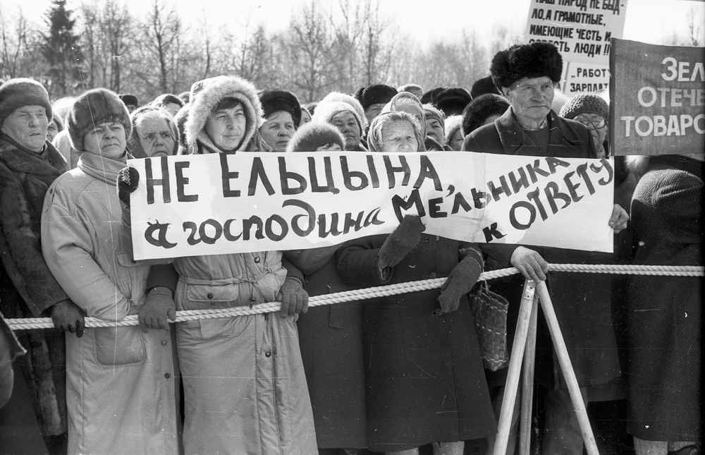 27 марта 1997 года на Народной площади состоялся митинг жителей города Переславля в рамках Всероссийской акции протеста профсоюзов «За труд, зарплату и социальные гарантии». Выступающие на митинге ораторы требовали от президента и правительства всенародно признать свою недееспособность, уйти с политической арены и таким образом частично искупить вину перед народом. Были выдвинуты претензии в адрес местного самоуправления, которое не ремонтирует больницу и подъезды, не приводит в порядок дороги, не борется с хулиганством, оставляет без поддержки учителей. На митинге была принята резолюция с резкими требованиями трудящихся. — Лозунг на плакате: «Не Ельцына, а господина Мельника к ответу» (имеется в виду Евгений Алексеевич Мельник, мэр города Переславля-Залесского). Слева направо: женщина, Эльвира Горская (работала на заводе художественной керамики), разные люди, Виктор Александрович (так ли?) Большаков.